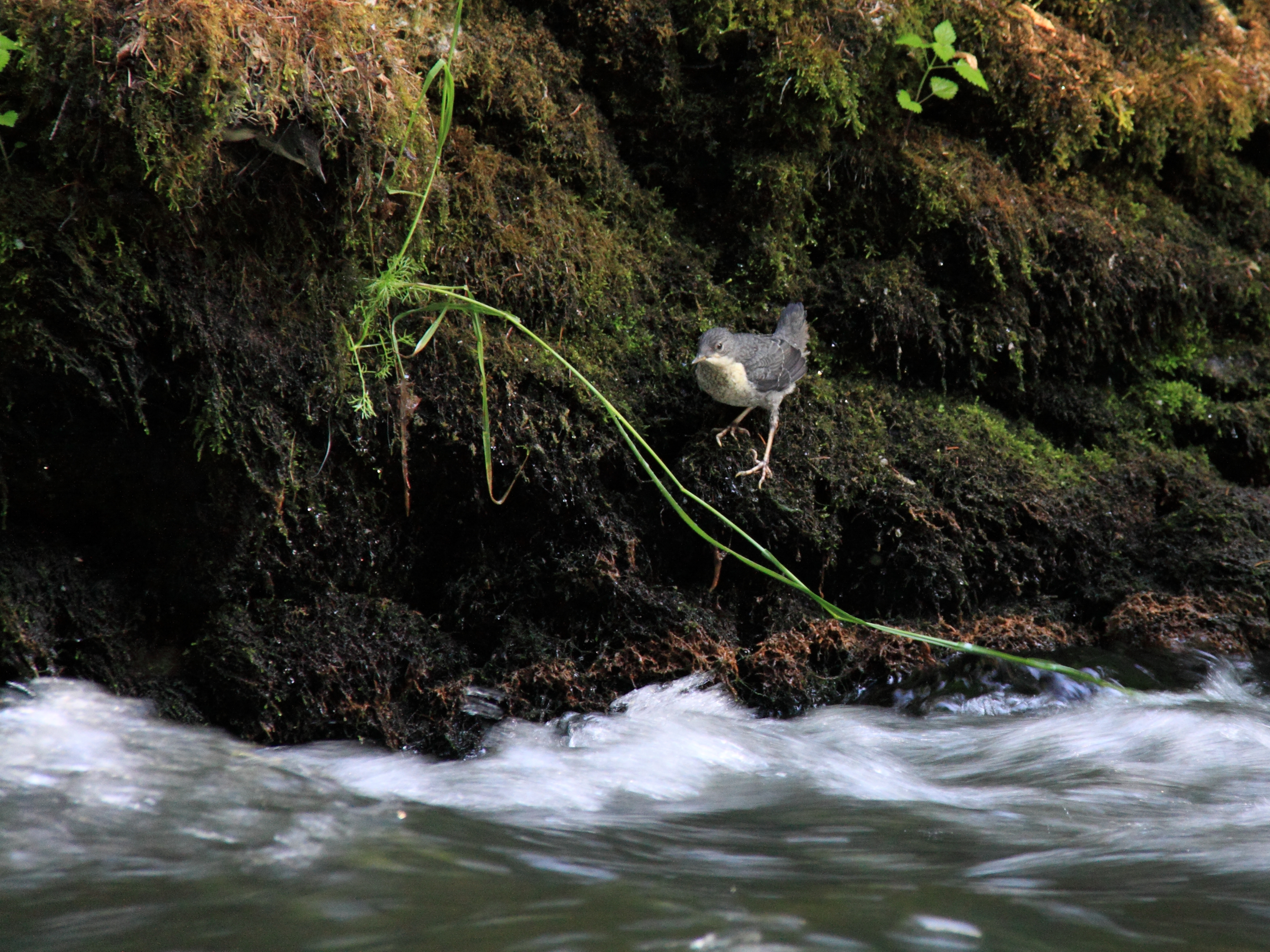 Cinclus cinclus (juvenil White-throated Dipper, Wasseramsel Jungvogel) NE-Slovakia, Slovak Paradise (Slovak: Slovenský raj) National Park, vic Cingov, ca. 600m asl., 24.06.2012 IMG_1152